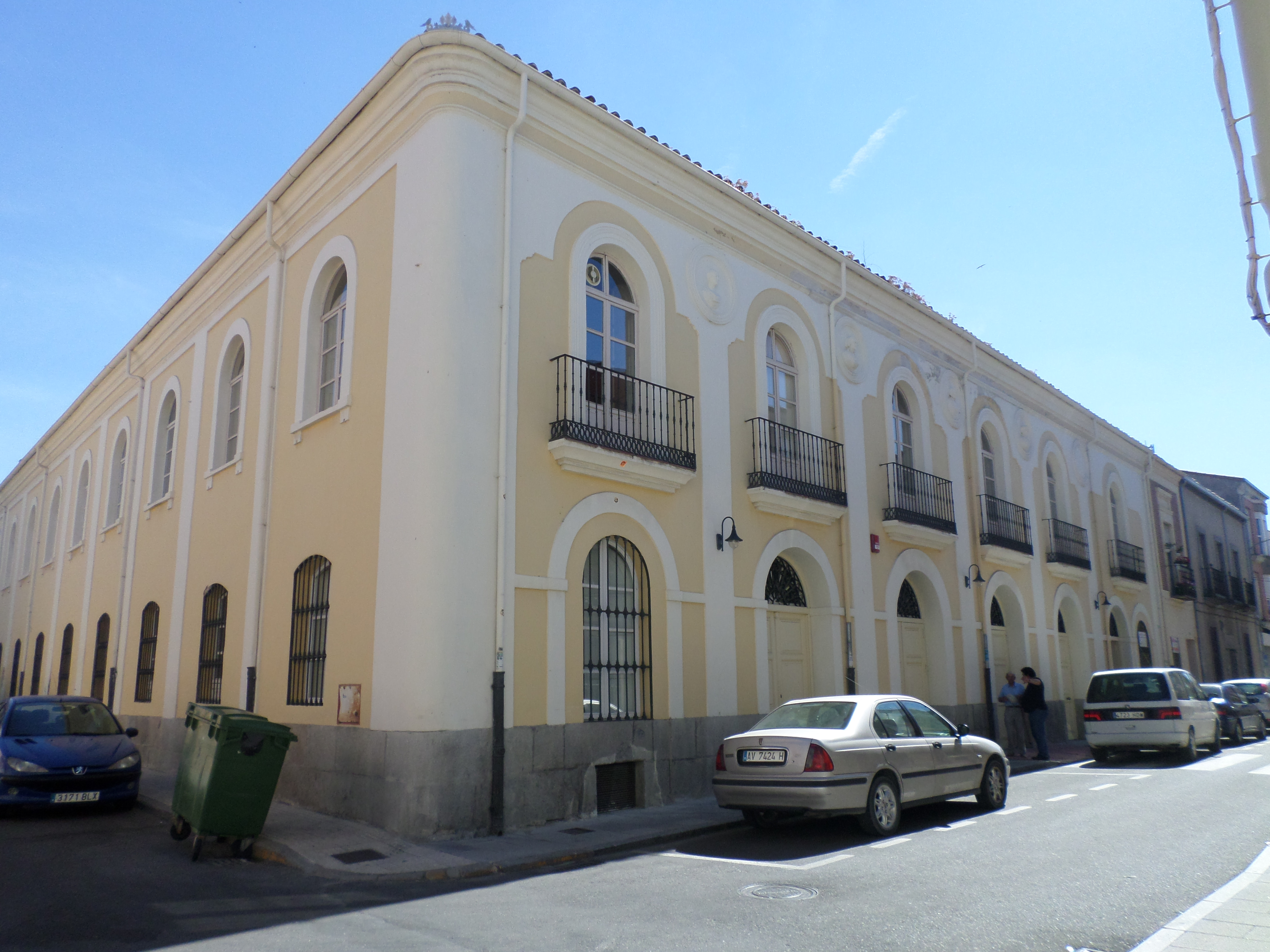 Imagen del Exterior del antiguo edificio del Casino de Peñaranda de Bracamonte en el que en la actualidad se alberga el Teatro-Cine Calderón de la Barca.